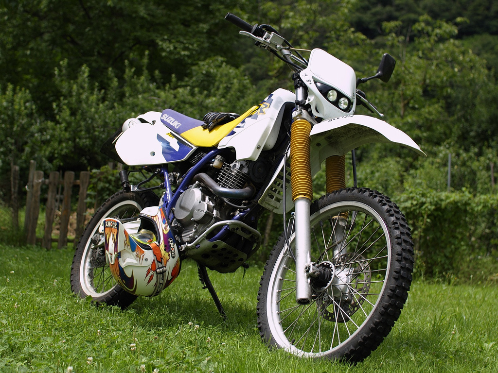 Suzuki DR 350 SE